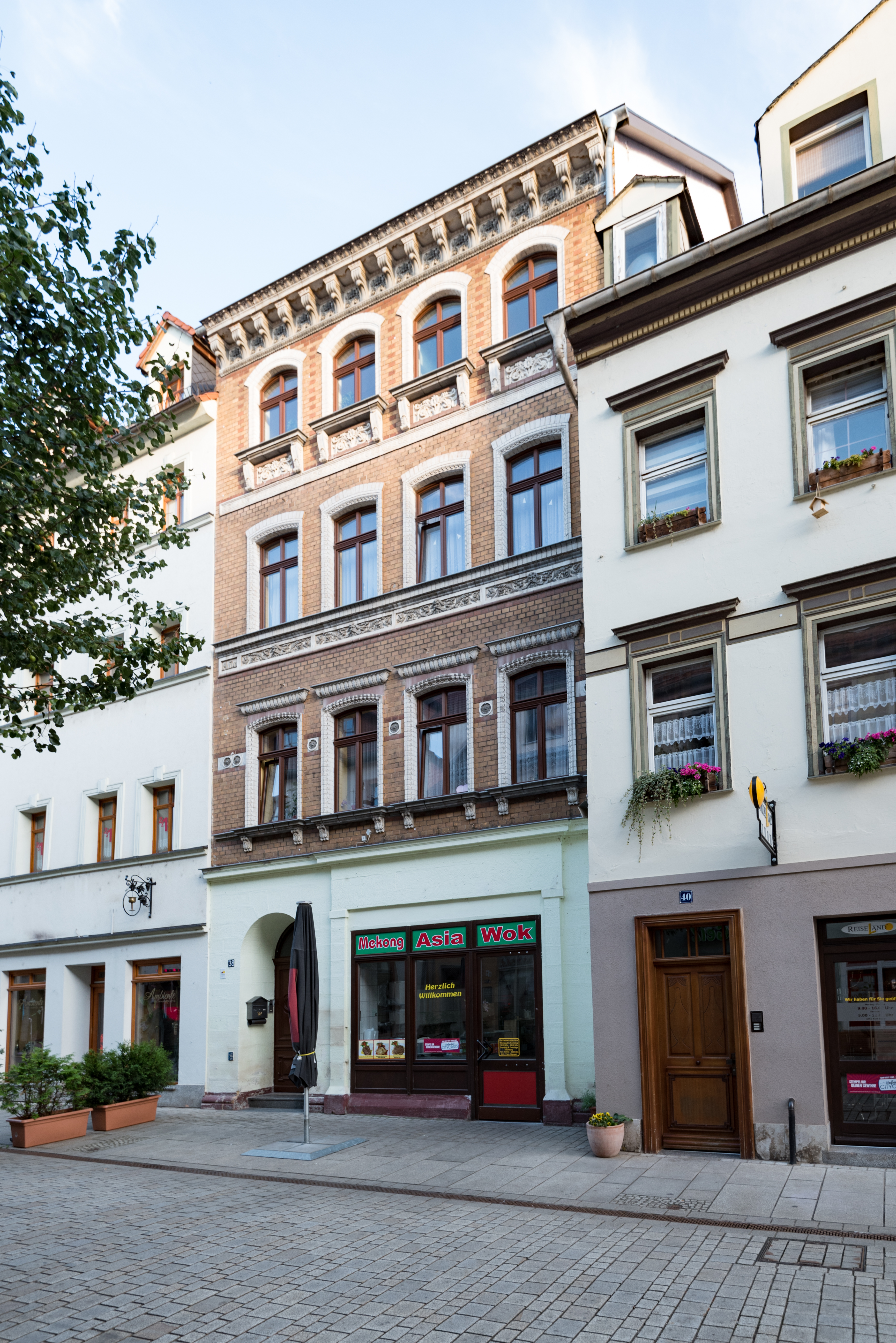 Weißenfels, Jüdenstraße 38